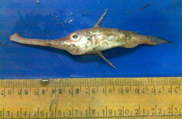 Macrorhamphosodes platycheilus, Indian Ocean, India.